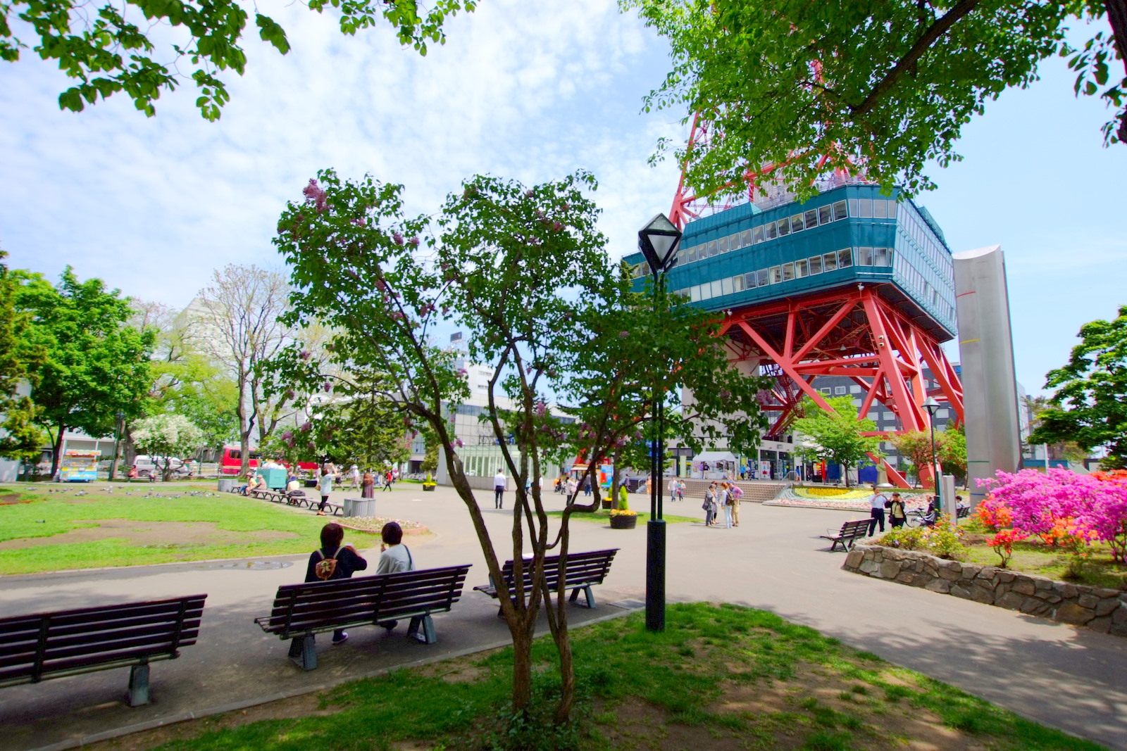 大通公園（Odori Park）